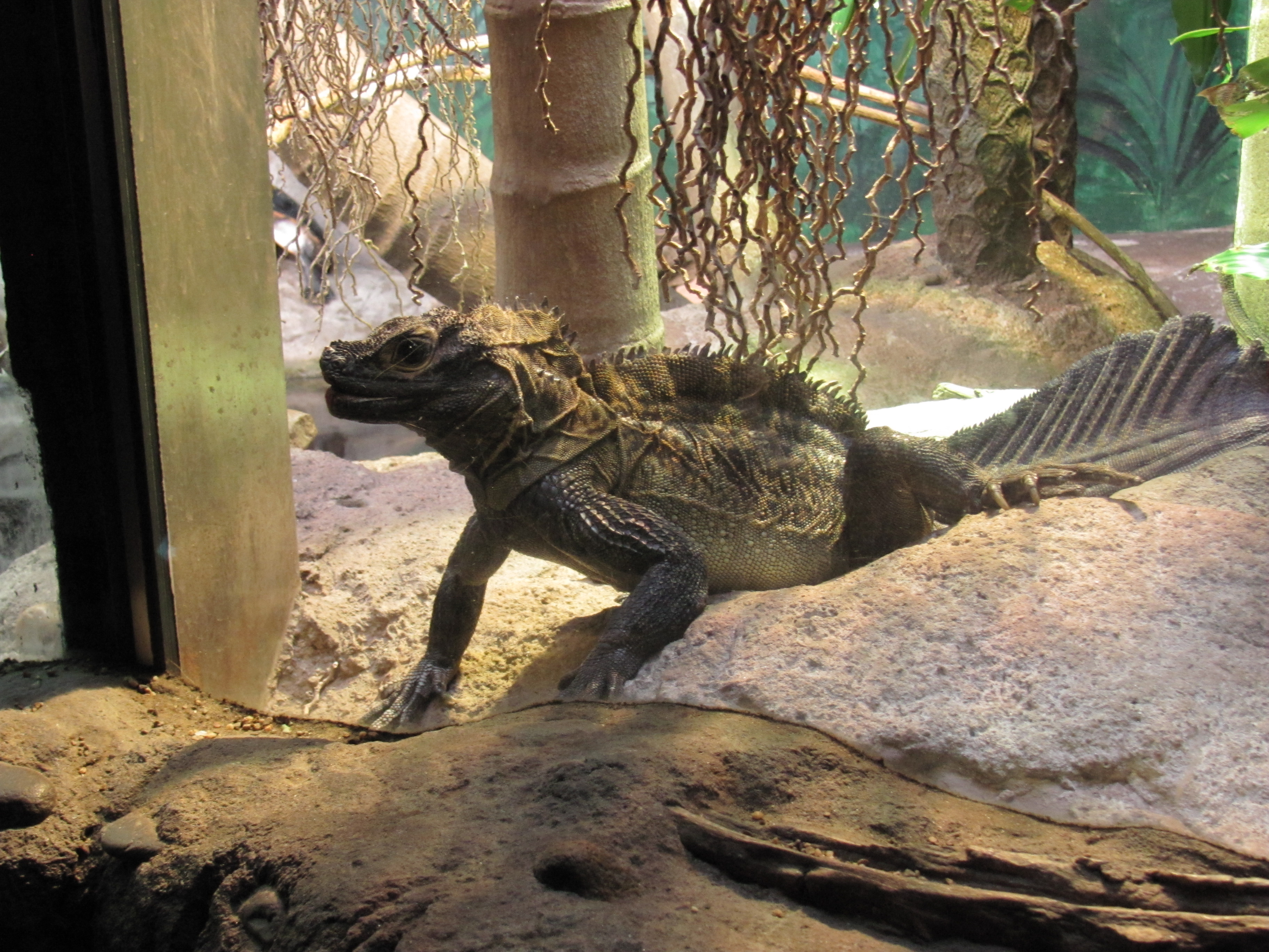 Sailfin Lizard (Hydrosaurus pustulatus)